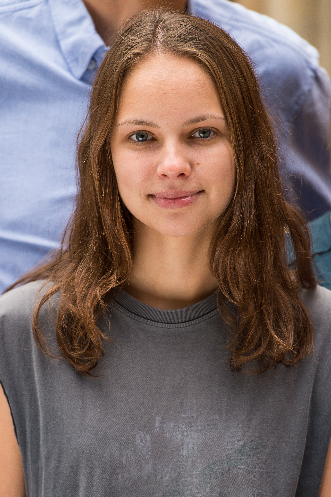 Barbara Prakopenka,Bayerischer Rundfunk,Das Recht sich zu sorgen,Franken-Tatort,Tatort